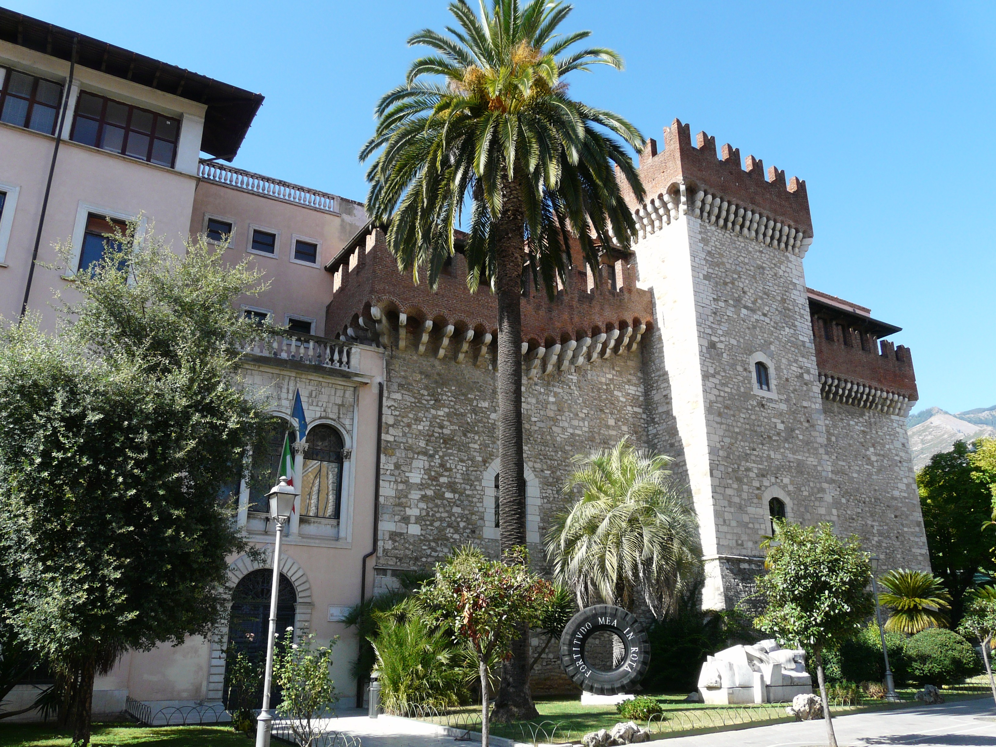 Palazzo Cybo Malaspina, Accademia delle Belle Arti di Carrara, Toscana, Italia